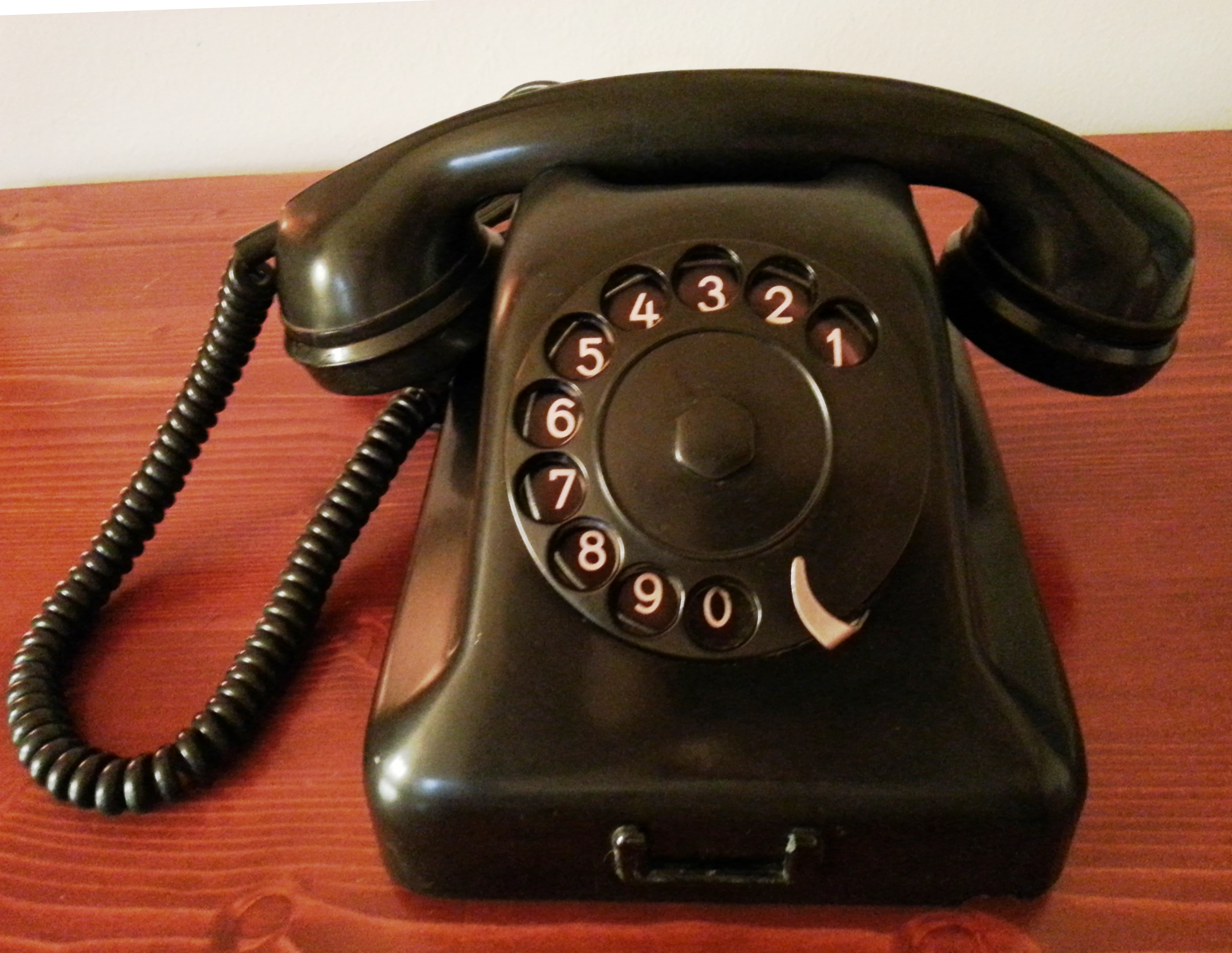 Iskrin avtomatski telefonski aparat ATA2 brez zemeljske tipke (glej začetek izdelave 1949.